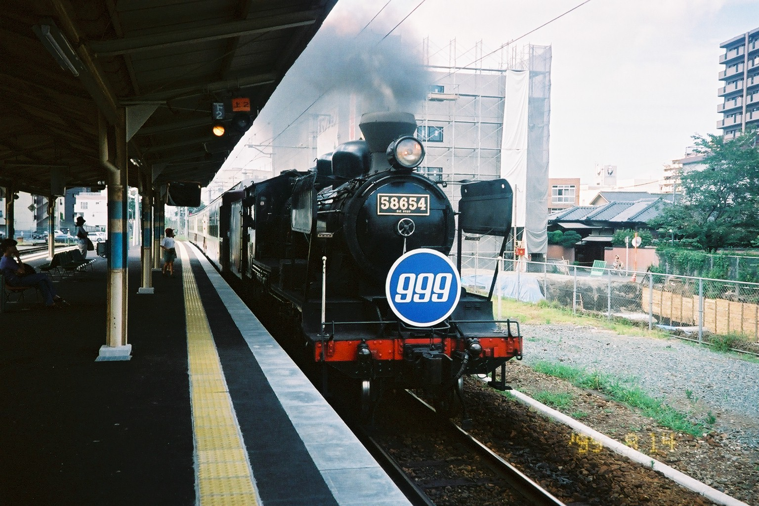 SLあそBOY号。1999年に行われた「銀河鉄道999号」とのタイアップイベント時のもの。